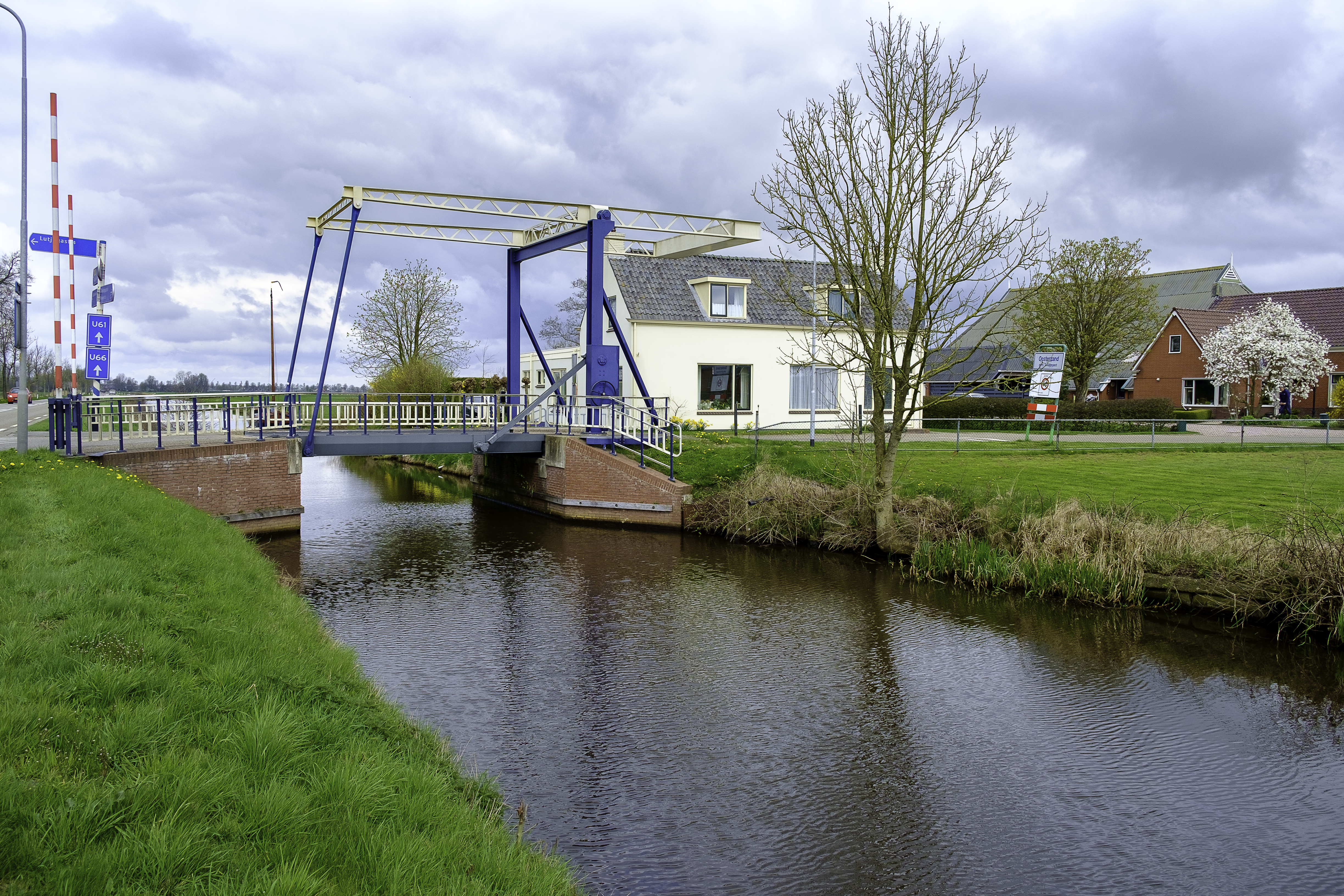 Zandumerklap over het Wolddiep bij Oosterzand. De brug dateert uit 2009.